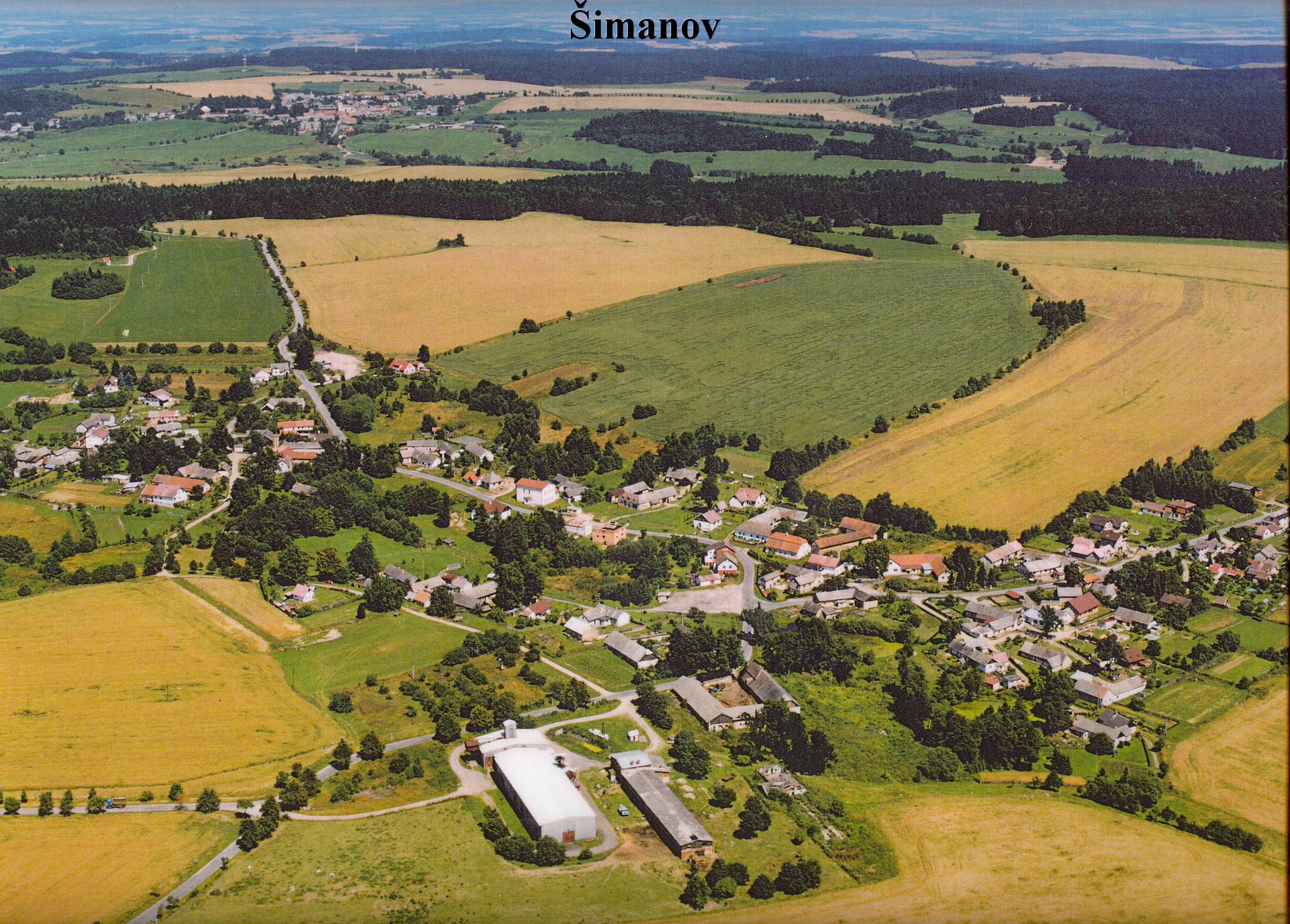 letecký snímek obce Šimanov